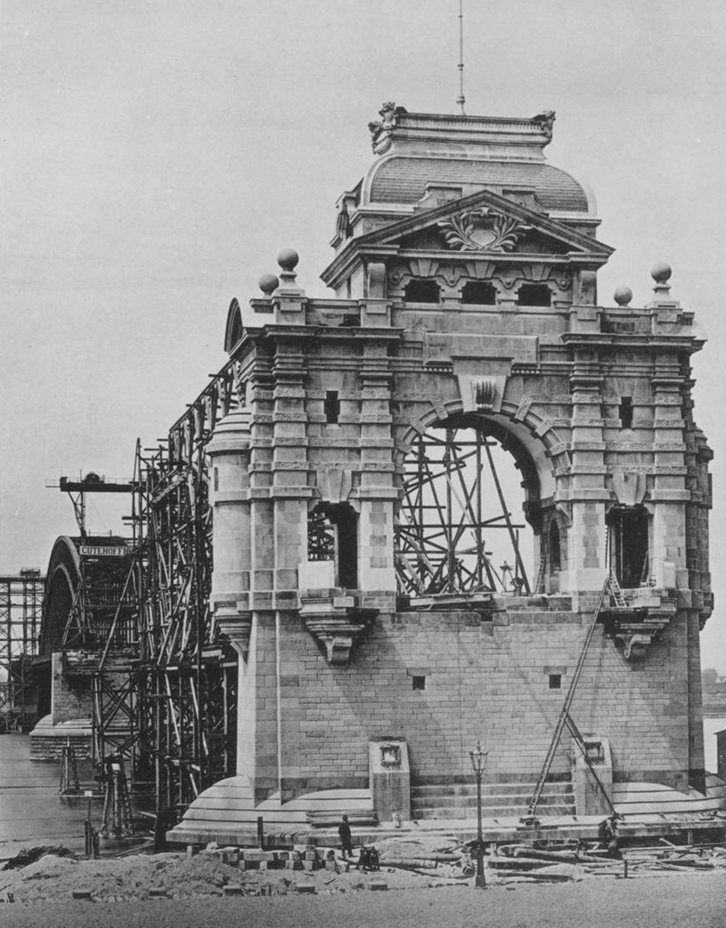 Rechter Uferpfeiler nach Fertigstellung. 9. Juni 1898 (Tafel 20)